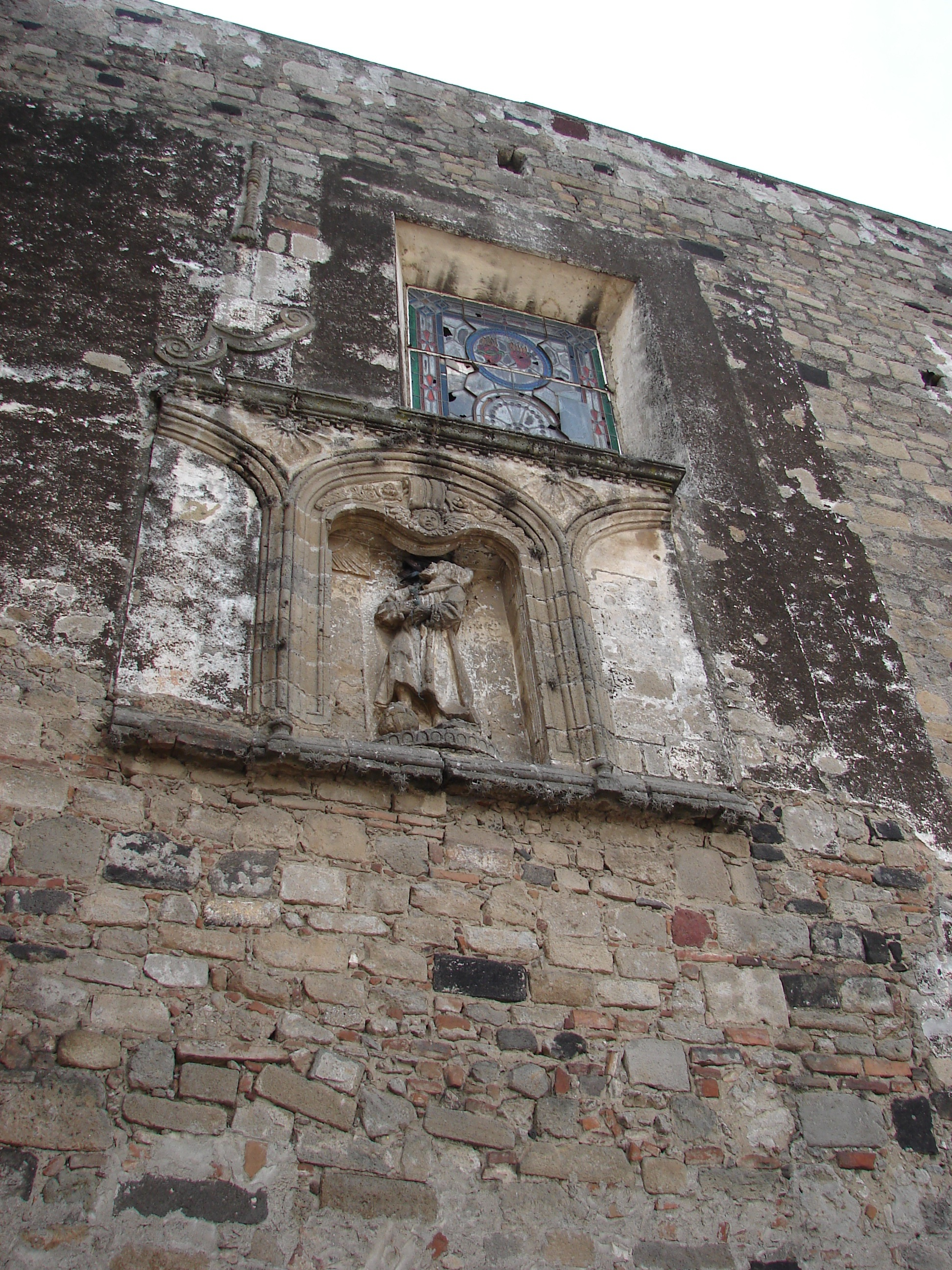 Detalla de la pared lateral. Templo de San Diego, Huejotzingo, Puebla, Mexico